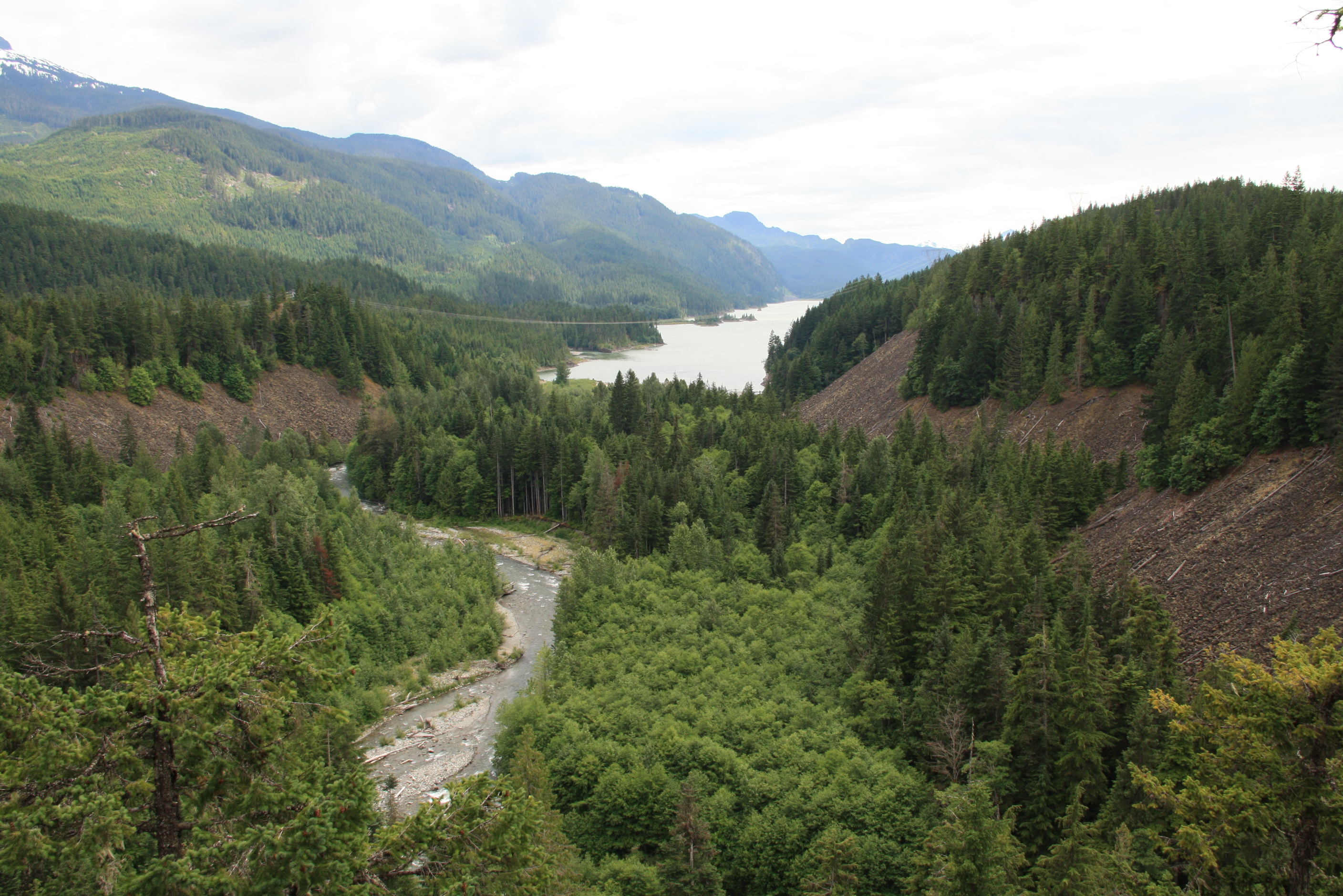 Tal im Brandywine Falls Provincial Park